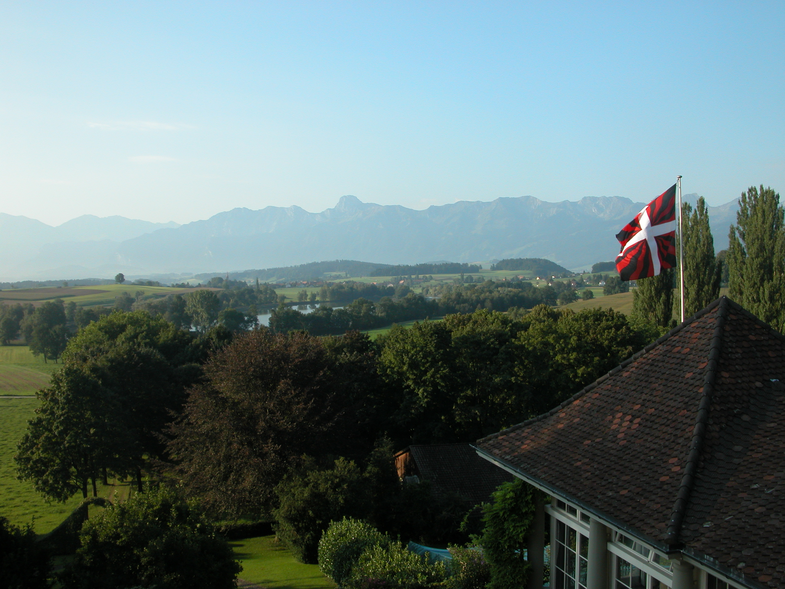 Gerzensee